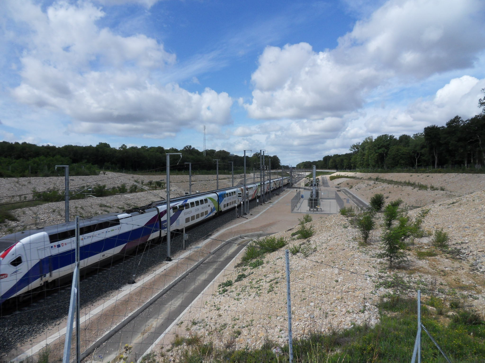 LGV Rhin-Rhône. Le train d'essai recouvert de son pelliculage spécial, constitué d'une rame TGV DASYE composée de 8 voitures encadrées par 2 motrices au cours d'une marche d’essai sur voie 1 dans le sens Villers-les-Pots — Mulhouse à proximite de la section de séparation 1,5Kv/25Kv de Villers-les-Pots.